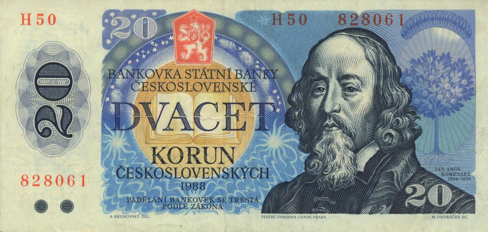 Banknote zu 20 tschechoslowakischen Kronen (Vorderseite)